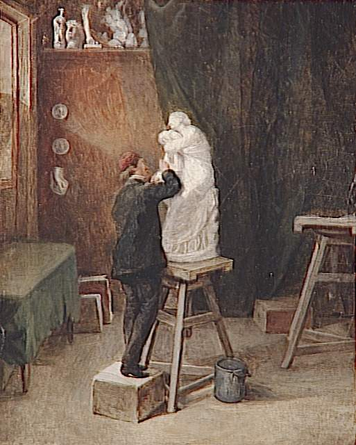 Eugène Aizelin (1821-1902) sculptant sa Sapho par Sophie Aizelin née Berger